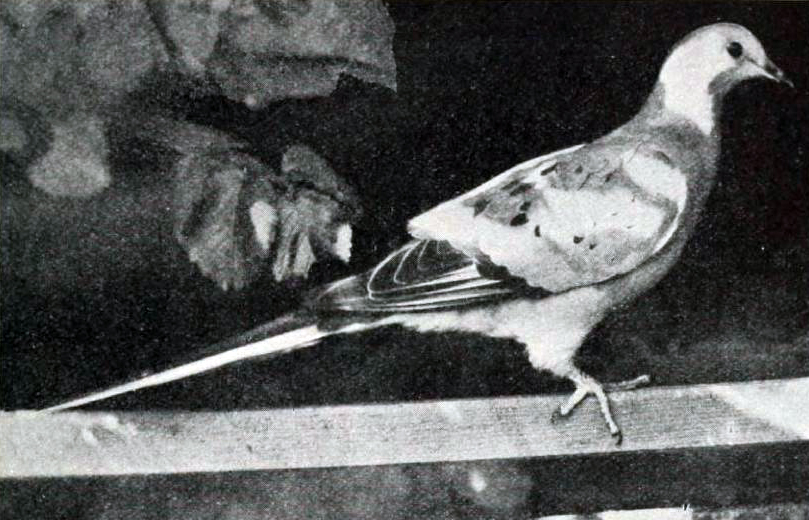 Captive Passenger Pigeon.